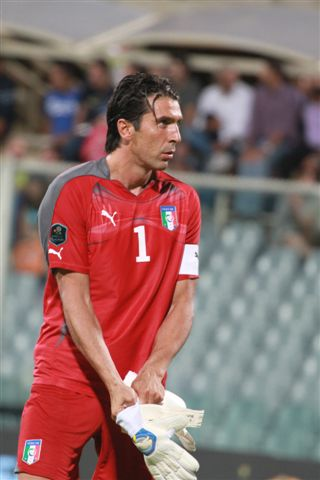 Il giocatore italiano durante Italia-Slovenia di qualificazione agli Europei 2012